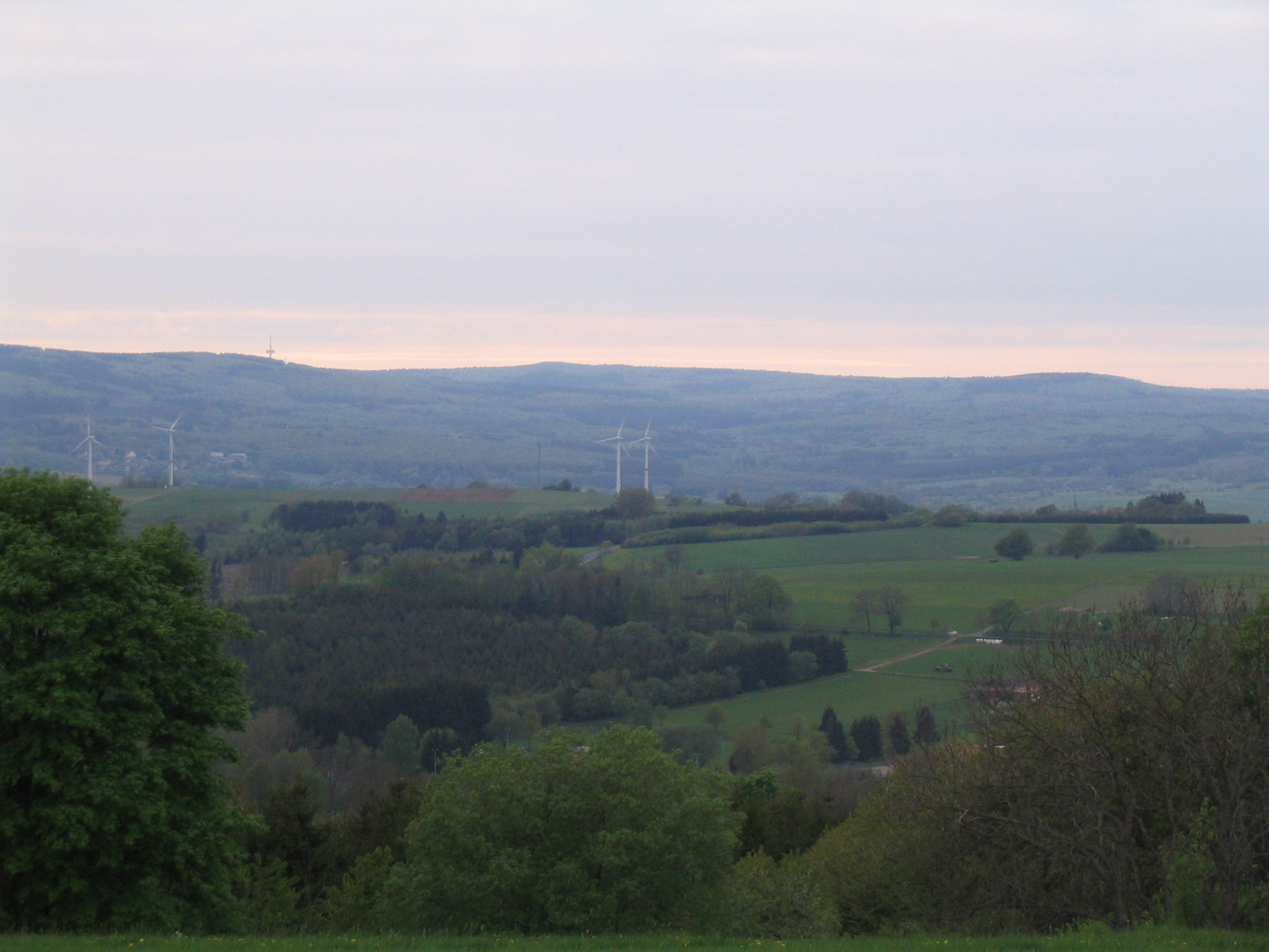 Blick vom Horst (553 m) nach Nordwesten zum Taufstein (773), dem höchsten Gipfel im Vogelsberg, der in der Bildmitte nur wenig aus der Gesamterhebung hervortritt.